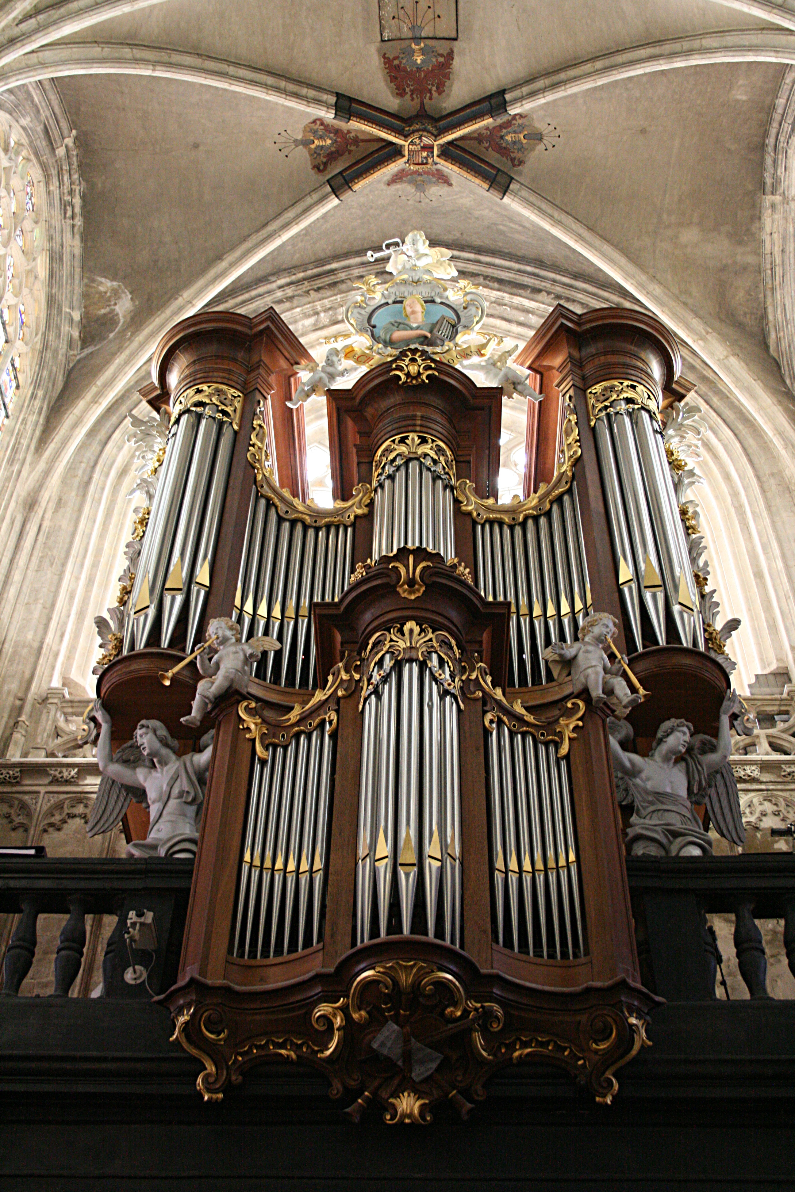 Onze-Lieve-Vrouw ter Zavel kerk, Brussel (belgië). Orgel (1763), werk van Jean-Baptiste Bernabé Goynaut